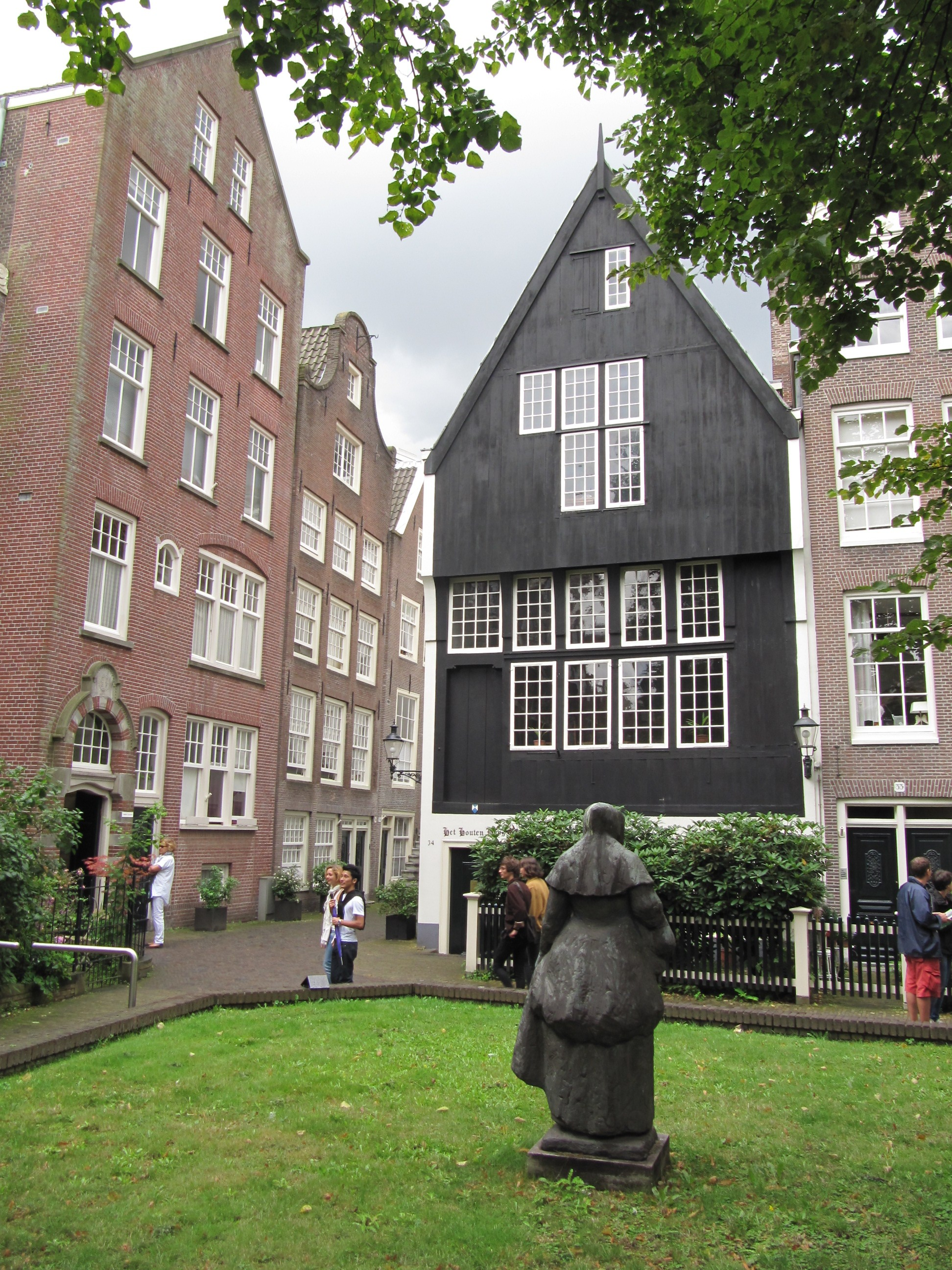 RM371 Amsterdam - Begijnhof 34.jpg